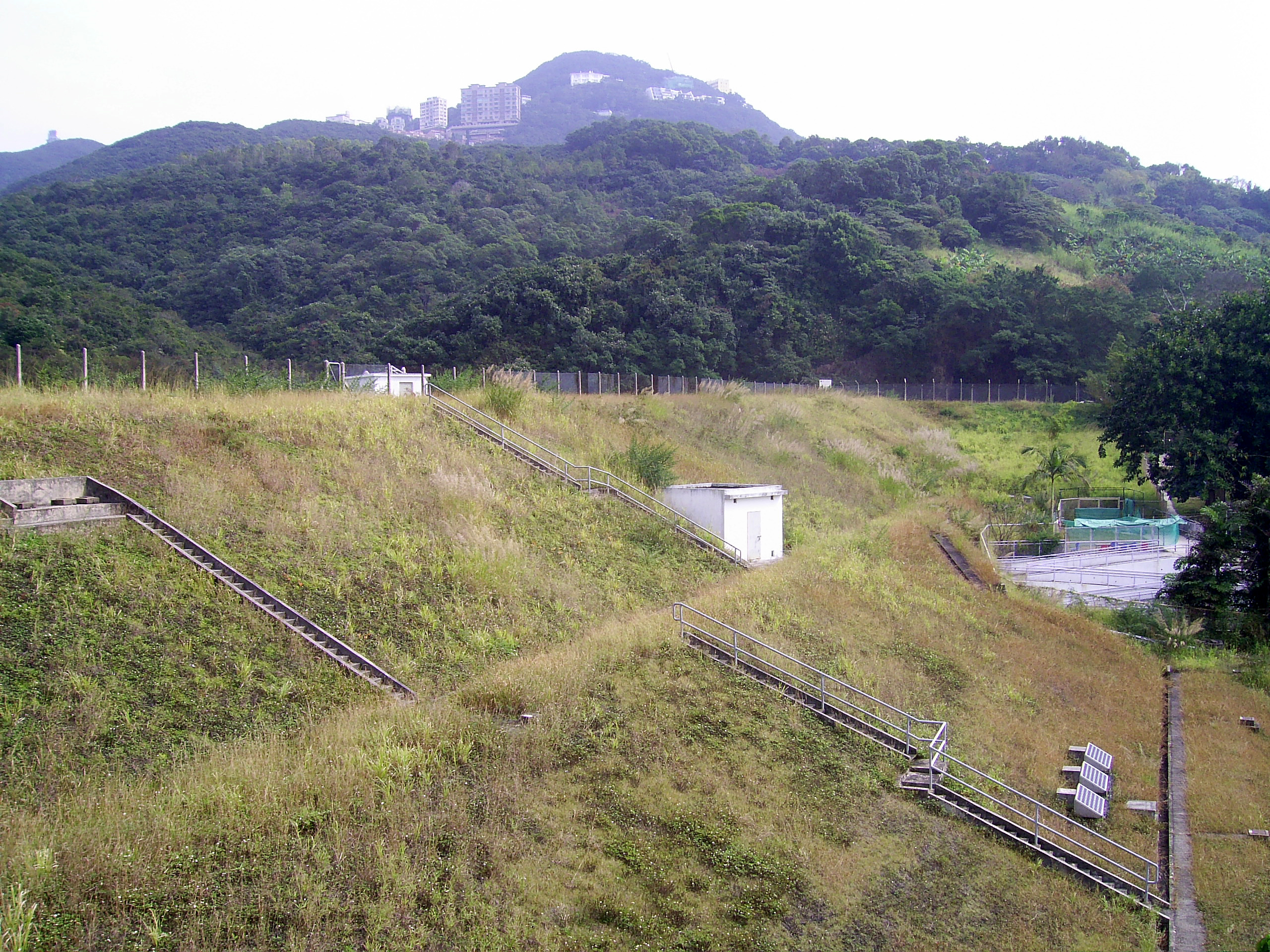 中文（香港）: 薄扶林水塘主壩